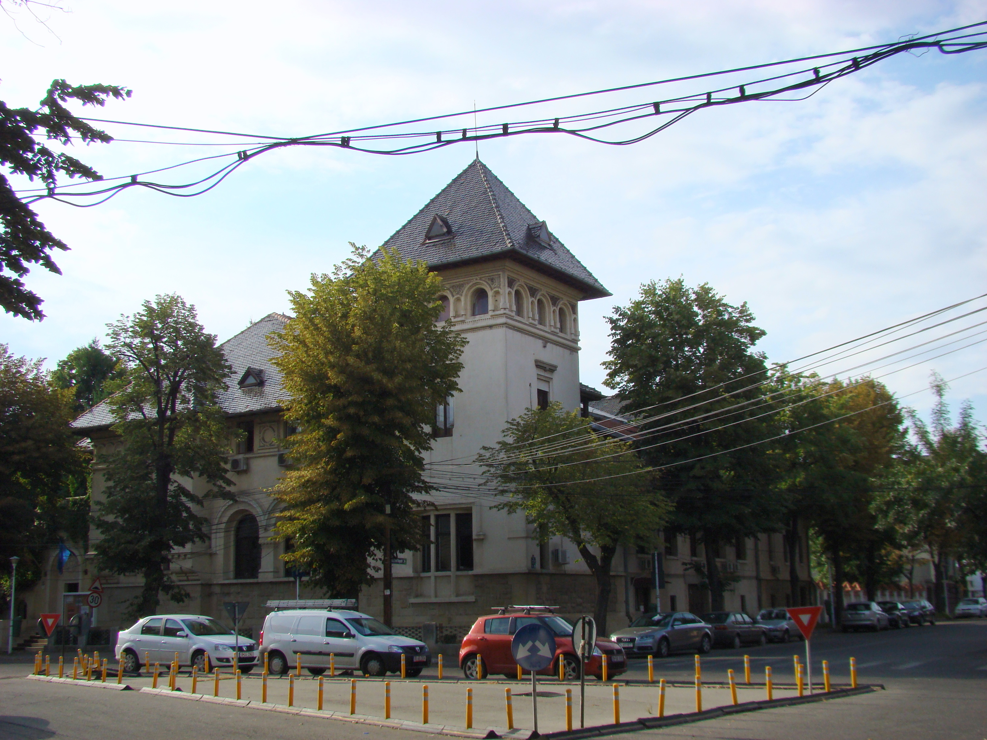 Casă monument istoric, str. Aleea Alexandru, nr. 40